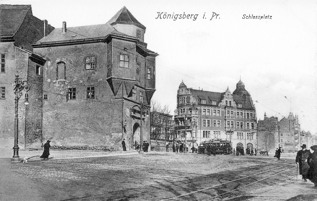 Östliche Schlossseite Blick zum Norden Richtung Schlossteich